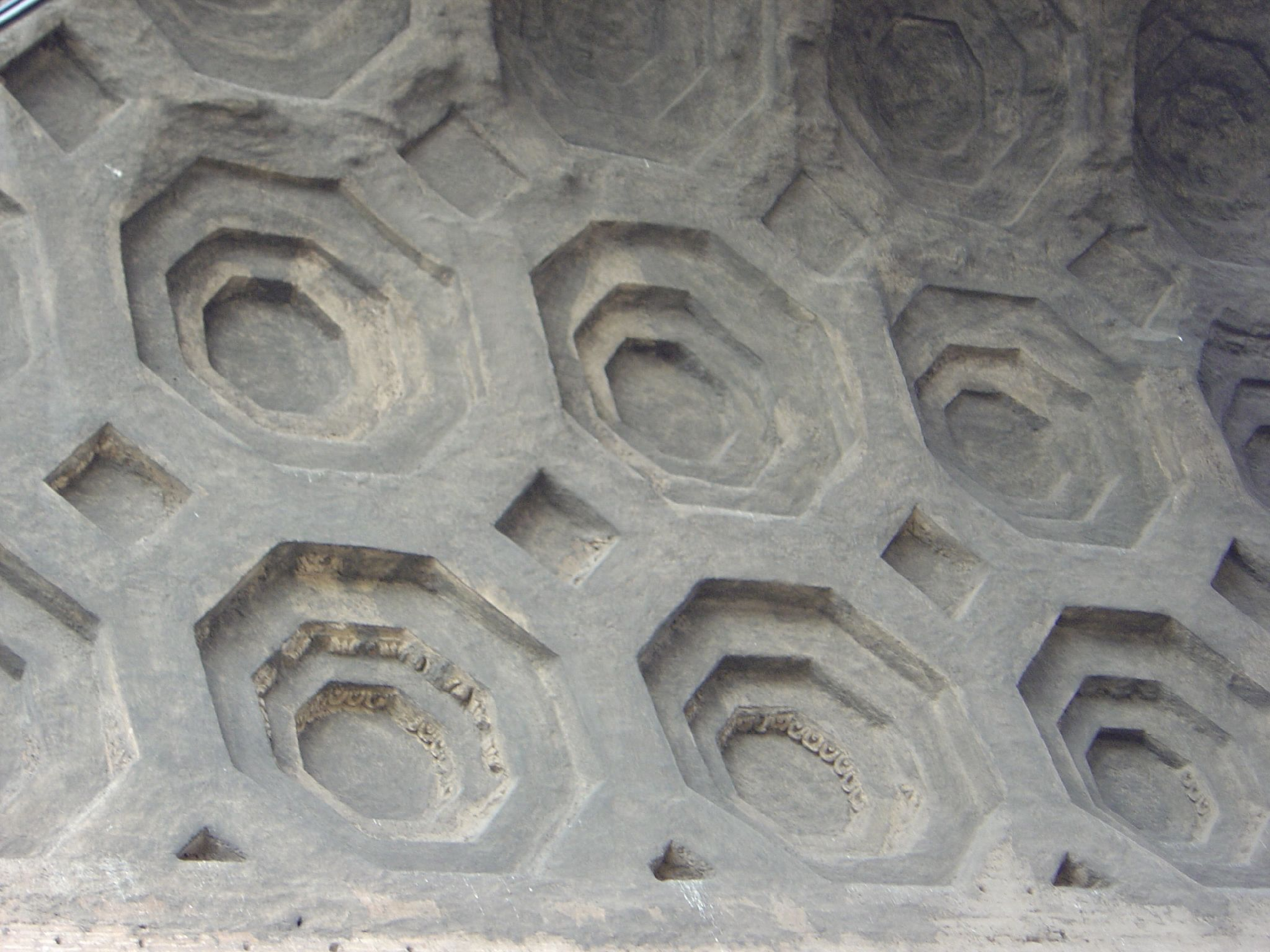 Ancient Roman concrete vault in Rome.